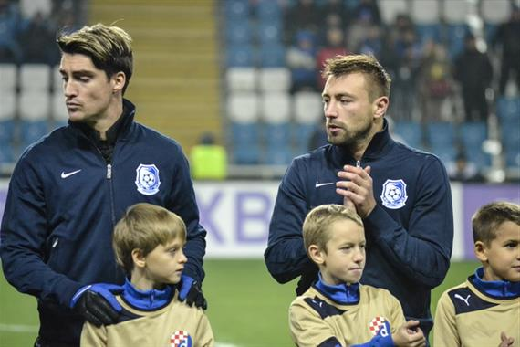 Сіто Рієра та Олексій Антонов 30 листопада 2013 року перед матчем із загребським Динамо.